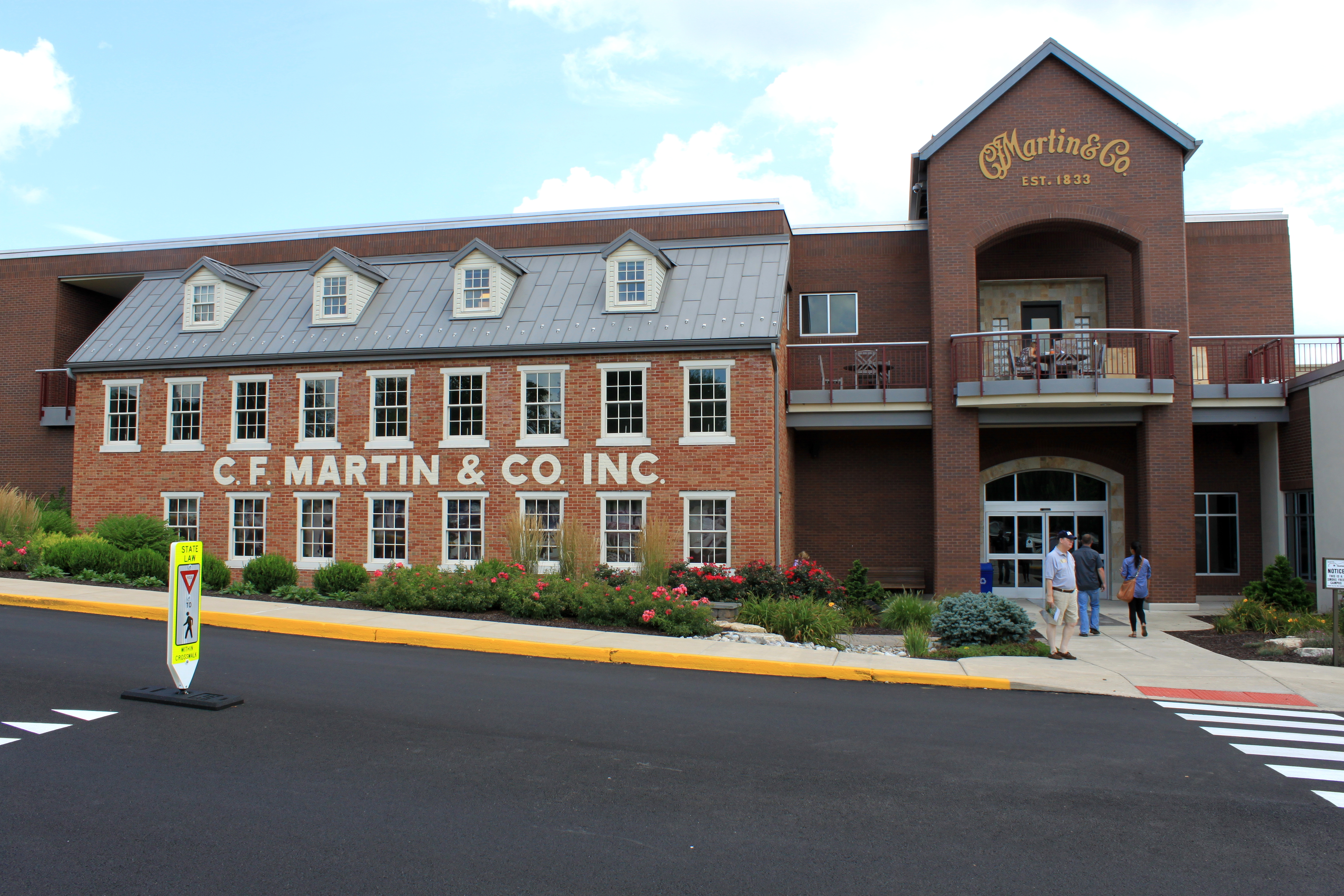 martin 001